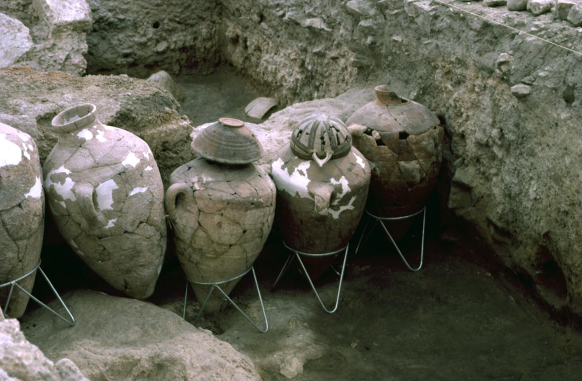 Tell Abu Hawam Excavation 2001 by Haifa University Israel. The head of the expedition was Professor Michal Artzy. משלחת חפירות ארכאולוגיות בתל אבו הואם שהתקיימה בשנת 2001 ע"י אוניברסיטת חיפה , החוג לציוויליזציות ימיות בראשות פרופ' מיכל ארצי. התל נמצא במפרץ חיפה והיה עיר נמל עתיקה באזור המפרץ מתקופת הברונזה המאוחרת ועד התקופה ההליניסטית This work is free and may be used by anyone for any purpose. If you wish to use this content, you do not need to request permission as long as you follow any licensing requirements mentioned on this page.